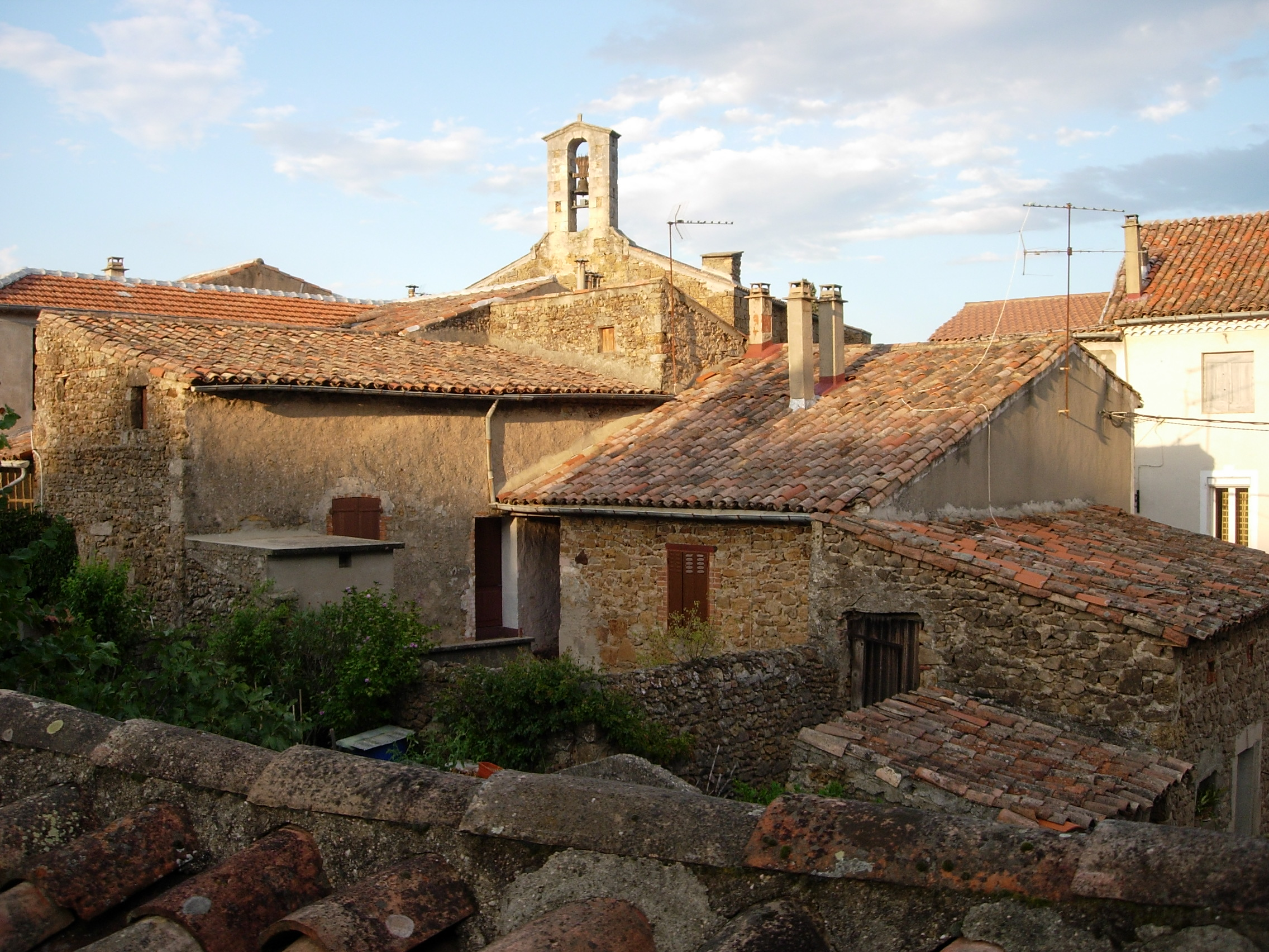 Photo personnelle. Le Mas-Dieu, Commune de Laval-Pradel. Habitat cévenol et vue sur l'église romane Saint-Pierre.